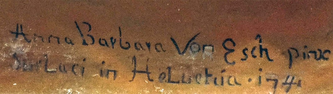 Anna Barbara Abesch (von Esch), volle Signatur